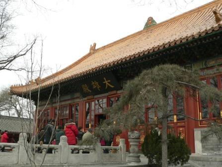 广济寺大雄殿。